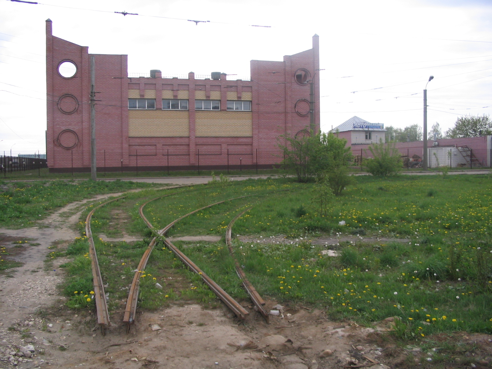 Конечная станция 5-го трамвая